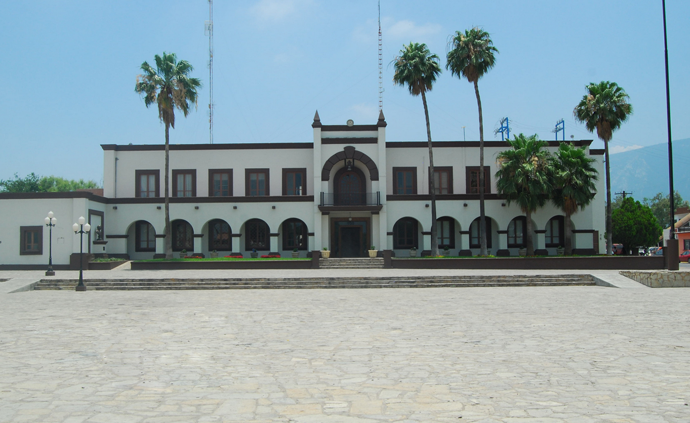 Palacio Municipal de Escobedo NL